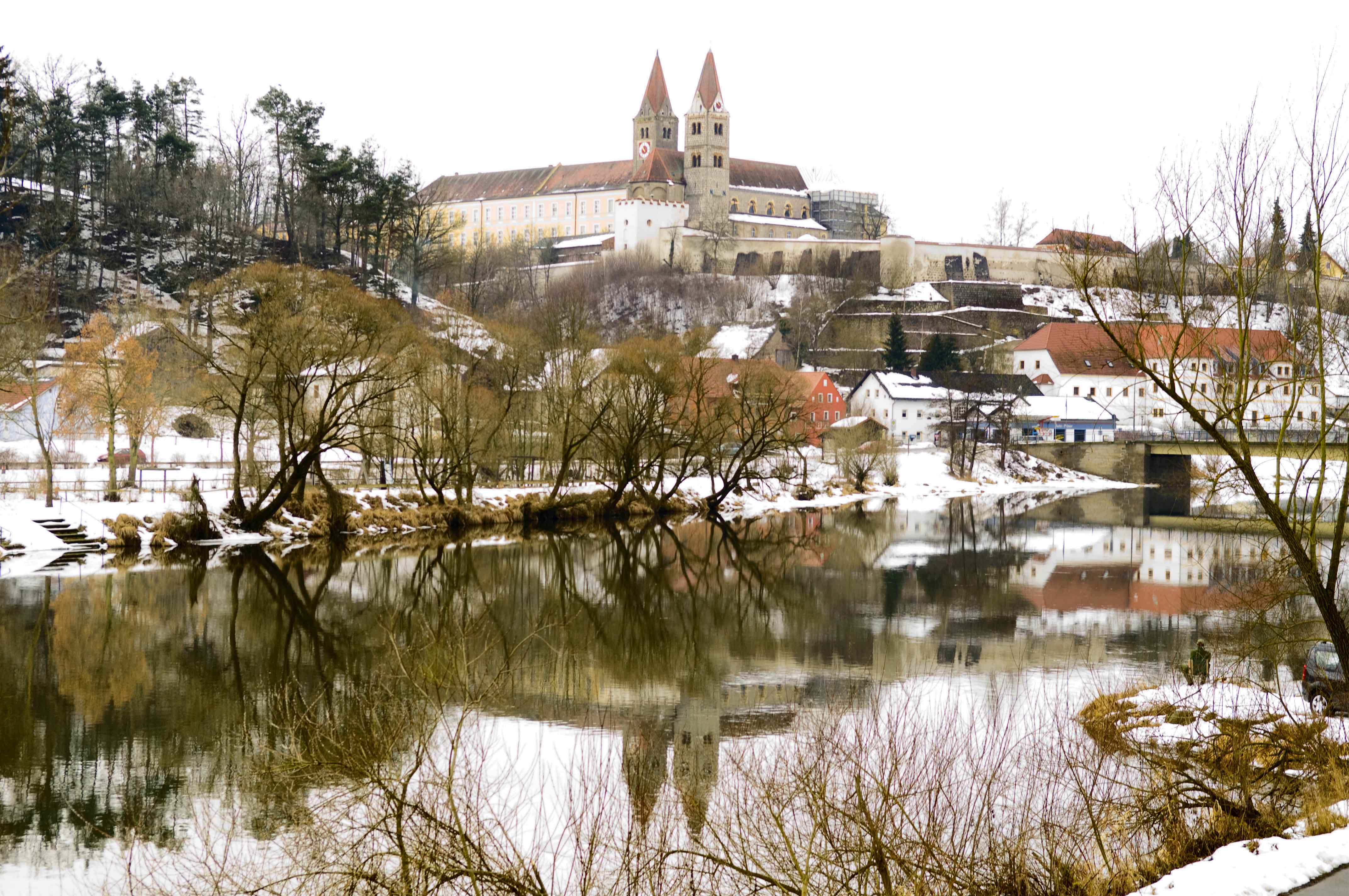 Kloster Reichenbach am Regen Ansicht